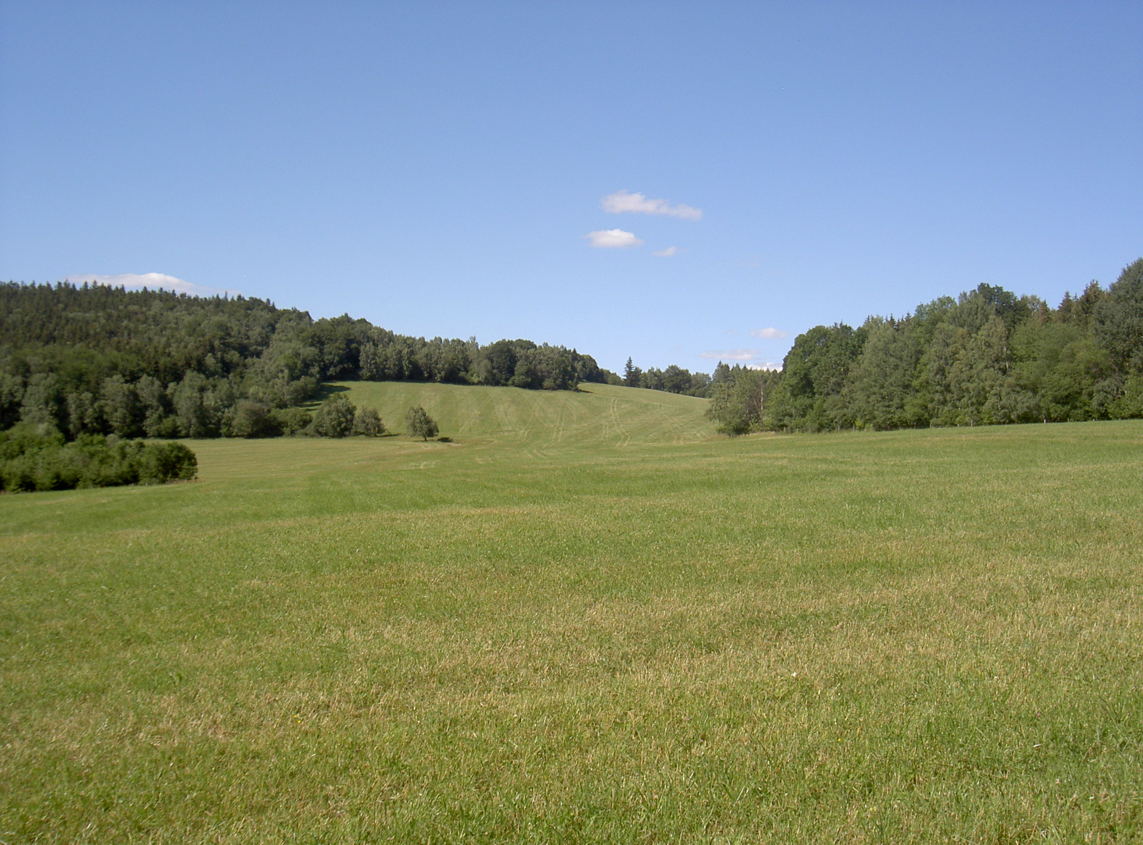 Výšina - Neubäuhöhe